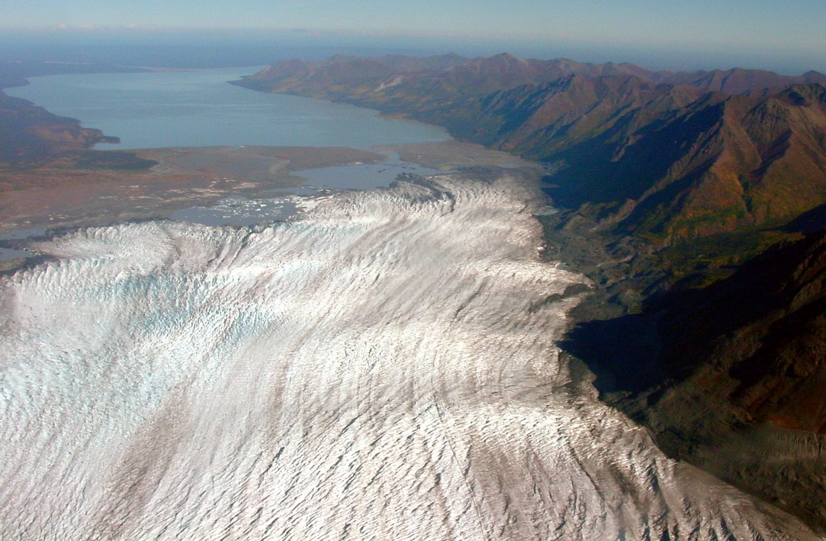 Tazlina Glacier in Alaska